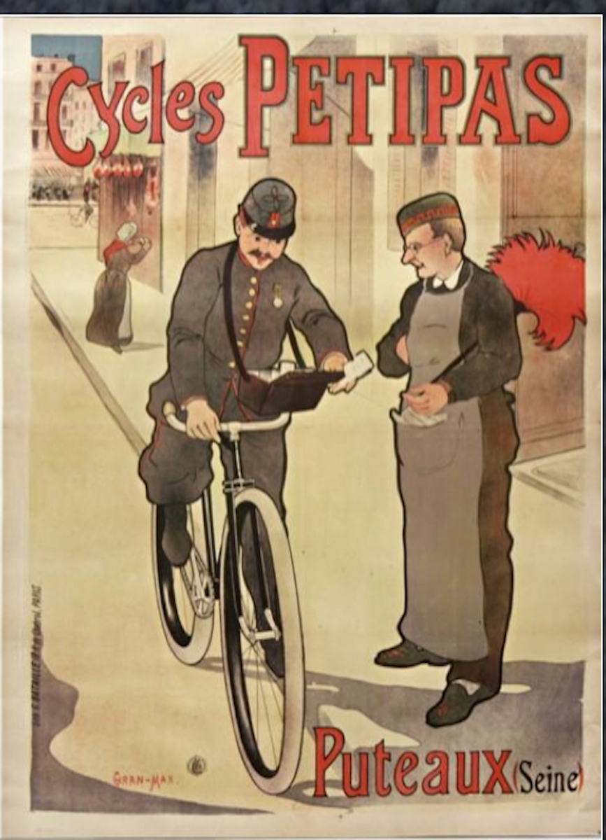 Léon Giran-Max (affiche) 1900, Cycle Petitpas, Puteaux (Seine), Collection Ucciani